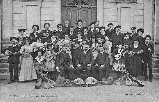 L'Estudiantina de Mayenne inspirée par les Estudiantinas universitaires.